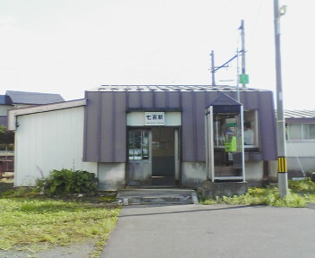 十和田観光電鉄 七百駅舎